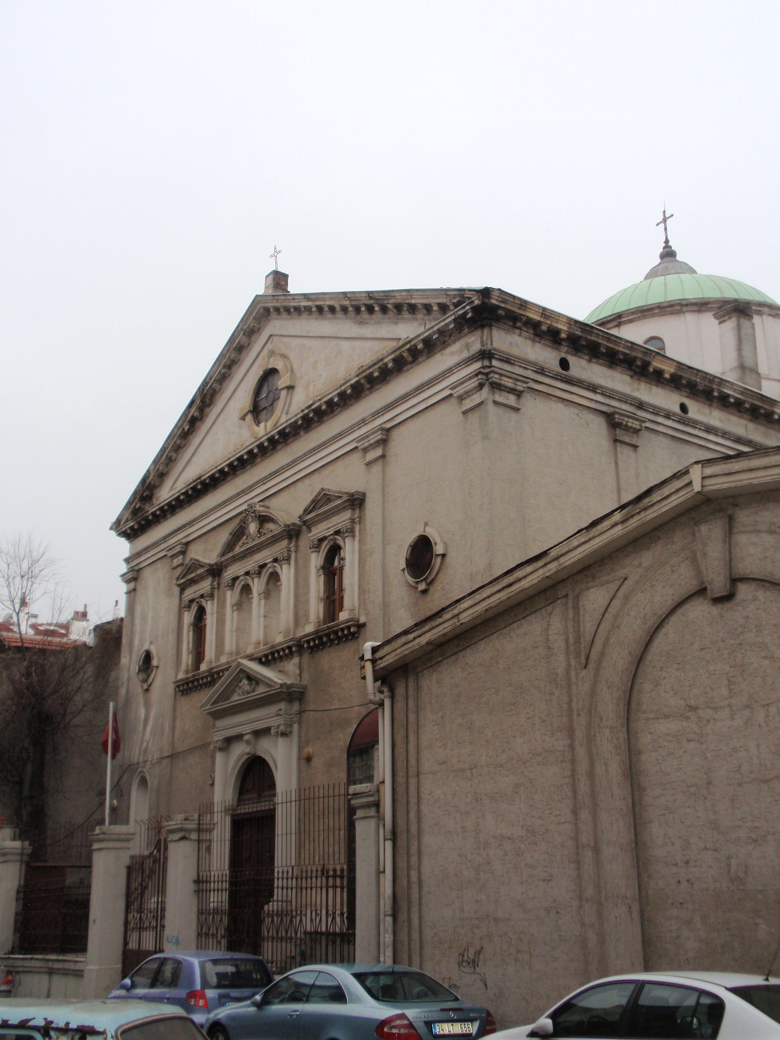 Meryem Ana Rosairo Kilisesi, Bakırköy